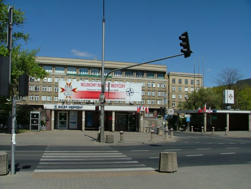 PL, Warsaw, Poland, Praga Południe, Grochów, ul. Szaserów 128, Wojskowy Instytut Medyczny, Centralny Szpital Kliniczny MON